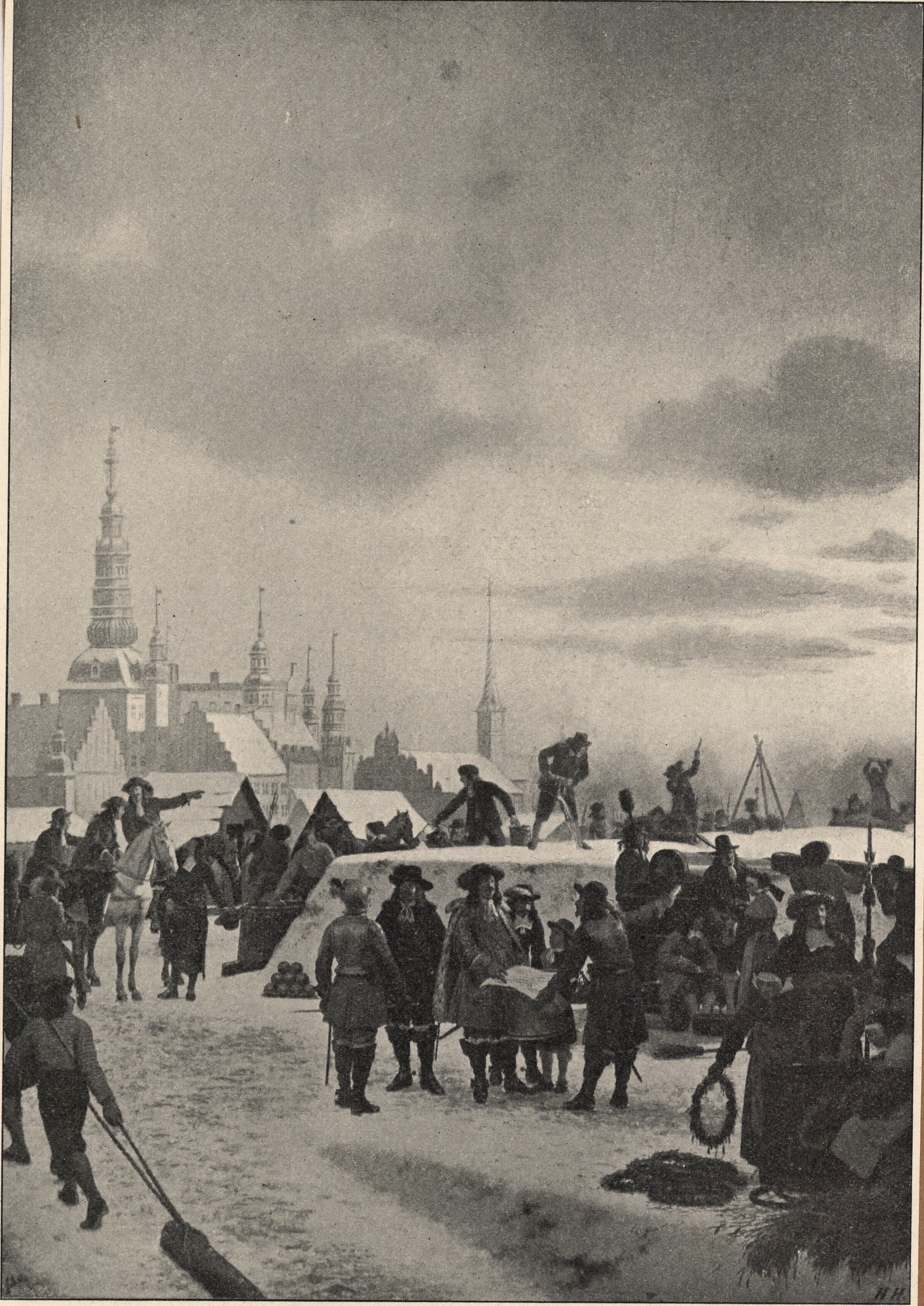 Stormen paa København 1659 av Heinrich Hansen (1821-1890).